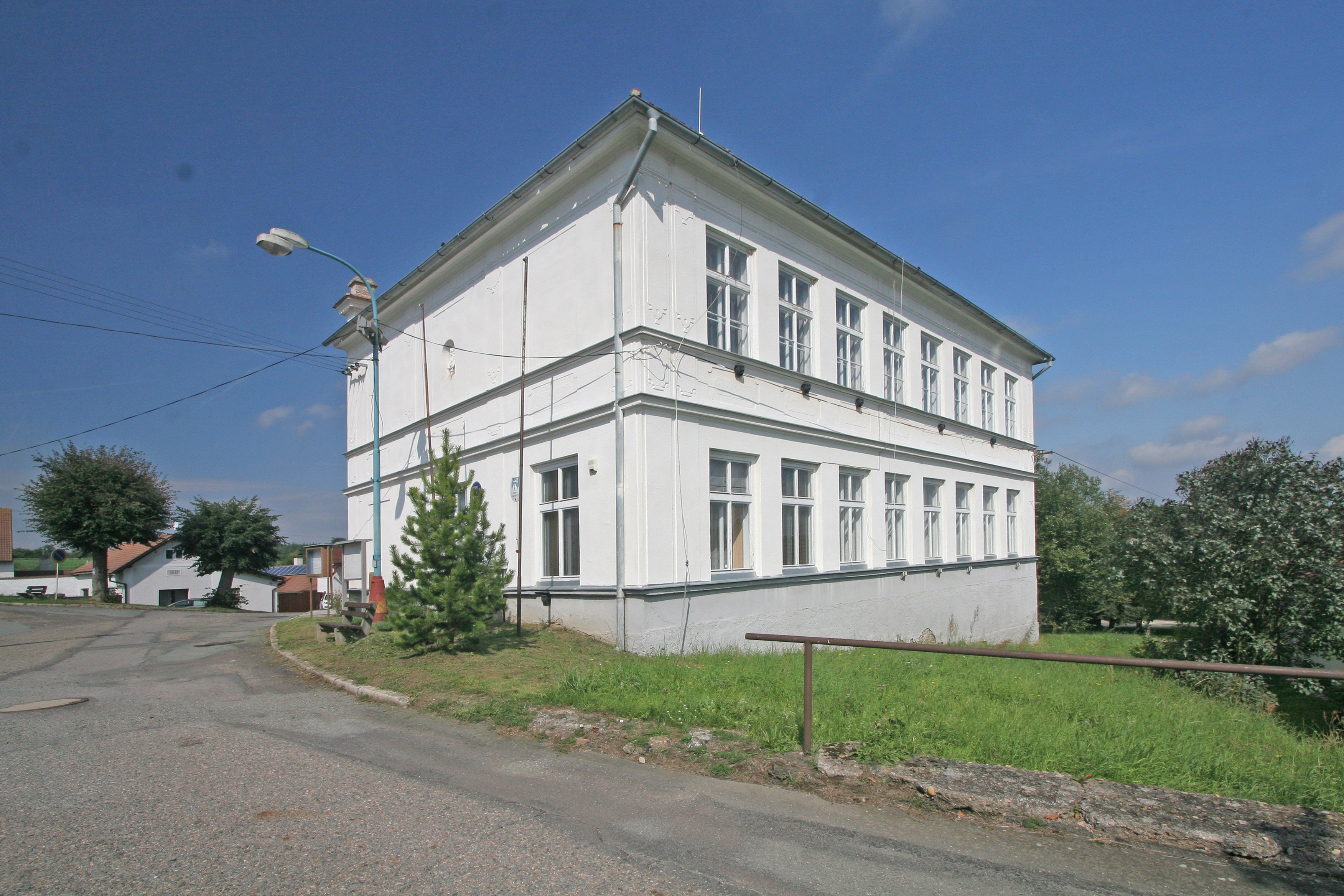 Kojice obecní úřad